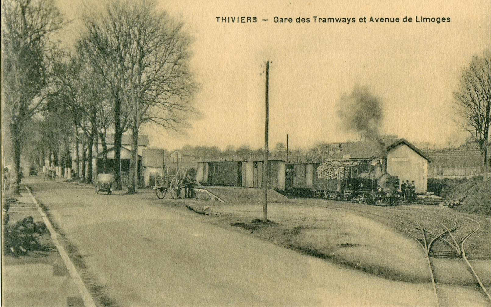 Carte postale ancienne, sans mention d'éditeur : THIVIERS - Gare des Tramways et Avenue de Limoge Il s'agit de la ligne de chemin de fer secondaire à voie métrique St Yrieix - Thiviers, des tramways de la Dordogne